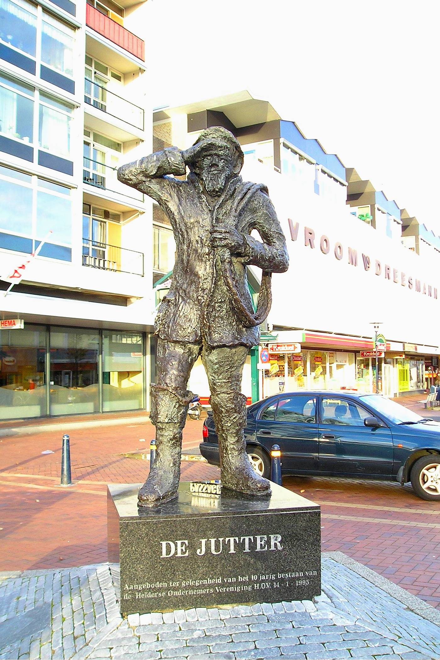 Denkmal de Jutter in Den Helder